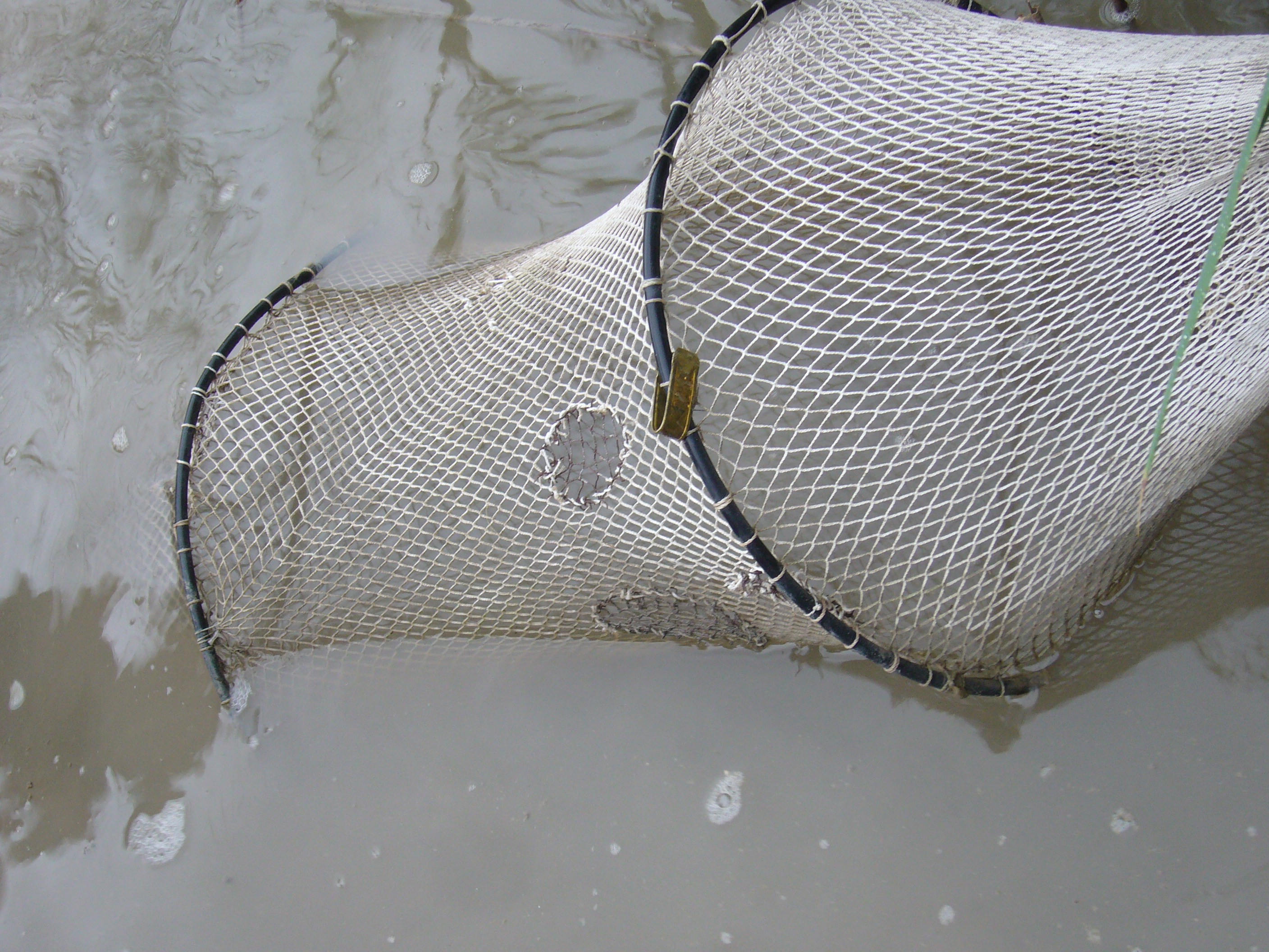 Seguiment tortuga d'estany a la Marjal Rafalell i Vistabella